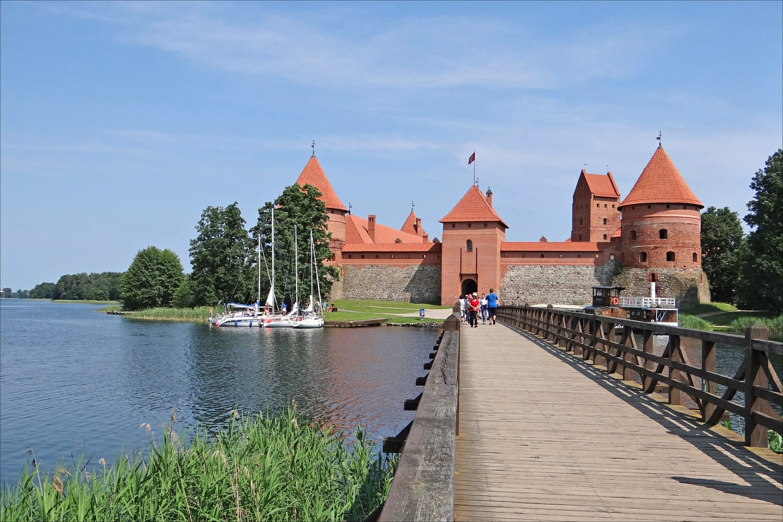 A une trentaine de kilomètres de Vilnius se trouve une zone de lacs aux bords desquels le Grand-Duc Kestutis , fils de Gediminas (voir le premier château de Gediminas à Vilnius), puis son propre fils Vytautas le Grand ont construit des bâtiments fortifiés pour créer un système défensif contre les chevaliers Teutoniques. Les lituaniens étaient alliés aux polonais contre les chevaliers envahisseurs. Il reste de cette période importante de l'histoire du pays, le château actuel construit à la fin du 14ème siècle sur une presqu'île au bord du lac Galvé et qui a été très restauré pour en faire un parc national historique, emblématique de l'identité de la Lituanie. Le site est un lieu de loisirs et la principale attraction touristique de la région de Vilnius. Trakai est aussi connue pour sa petite communauté de Juifs karaïtes, qui y sont installés depuis que le grand-duc Vytautas le Grand les a engagés pour la garde de la forteresse au début du XVe siècle. Extrait de l'article de Wikipedia sur Trakai